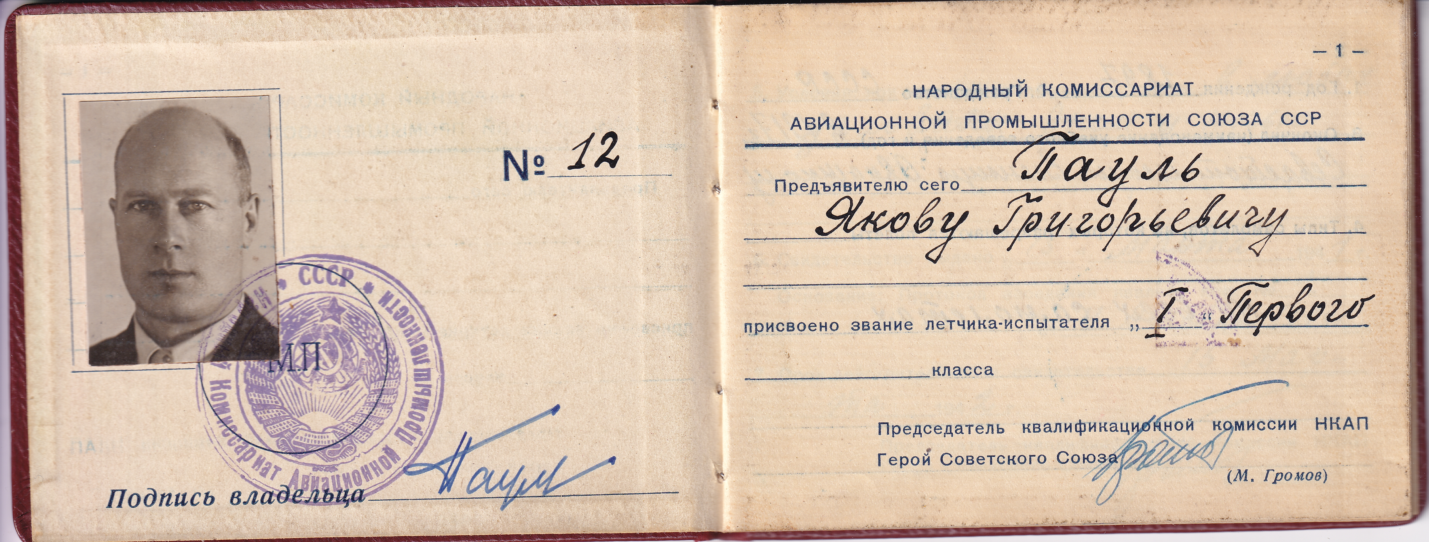 Свидетельство лётчика-испытателя I (Первого) класса №12 выдано лётчику Якову Георгиевичу Паулю 15 марта 1941 года на основании Протокола №1 от 4 декабря 1940 года заседания квалификационной комиссии Народного комиссариата авиационной промышленности Союза ССР. Удостоверение подписано председателем квалификационной комиссии НКАП Героем Советского Союза М. Громовым. В свидетельстве указано, что Я.Г.Пауль окончил Севастопольскую летную школу в 1917 году